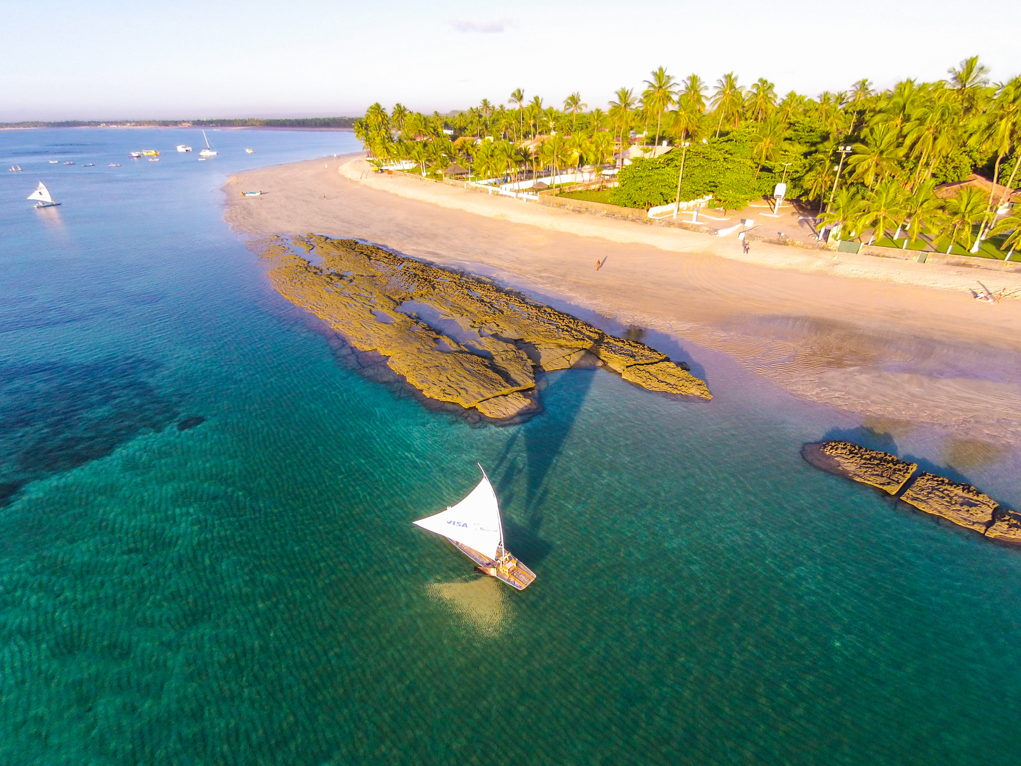 Praia de Porto de Galinhas, em Pernambuco